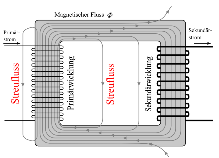 Streufluss eines Trafos